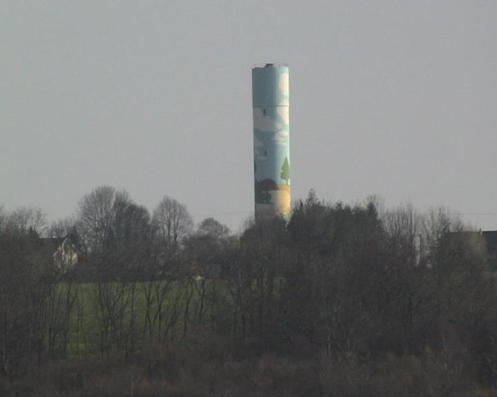 Château d'eau du Plessier sur Bulles